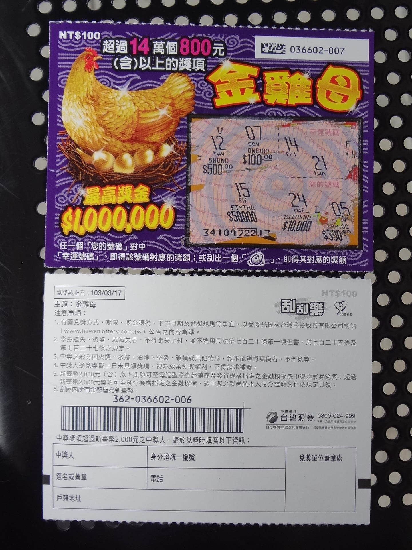 2014年台灣彩券刮刮樂「金雞母」正面及反面。